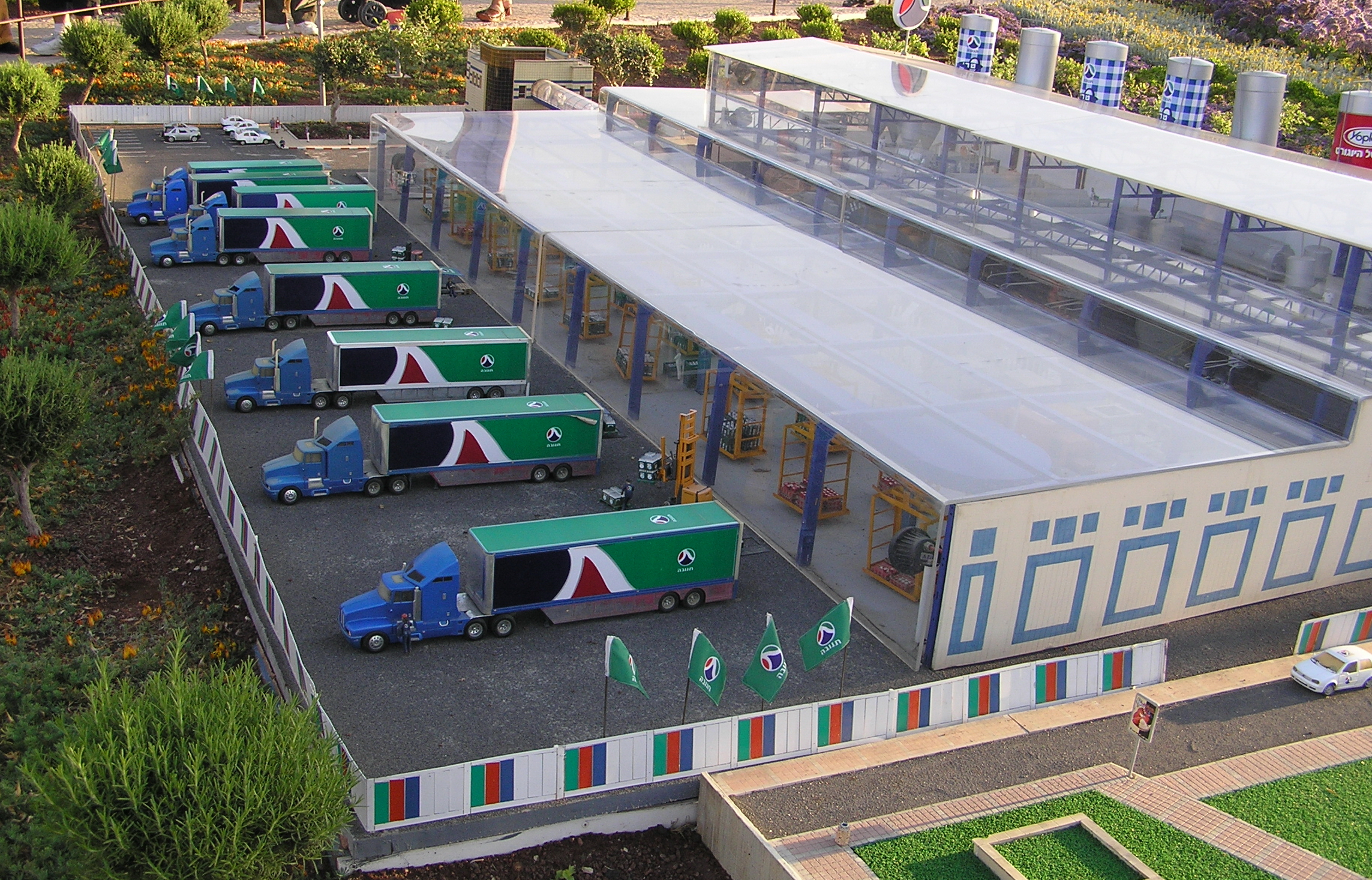 דגם תנובה באתר מיני ישראל